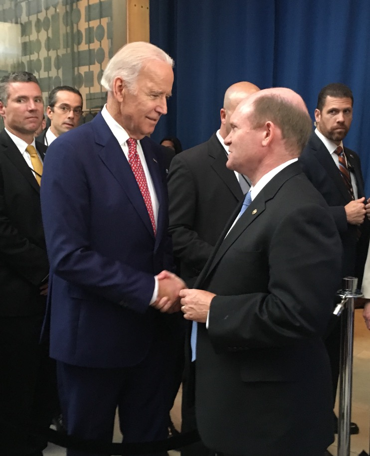 DNC Biden